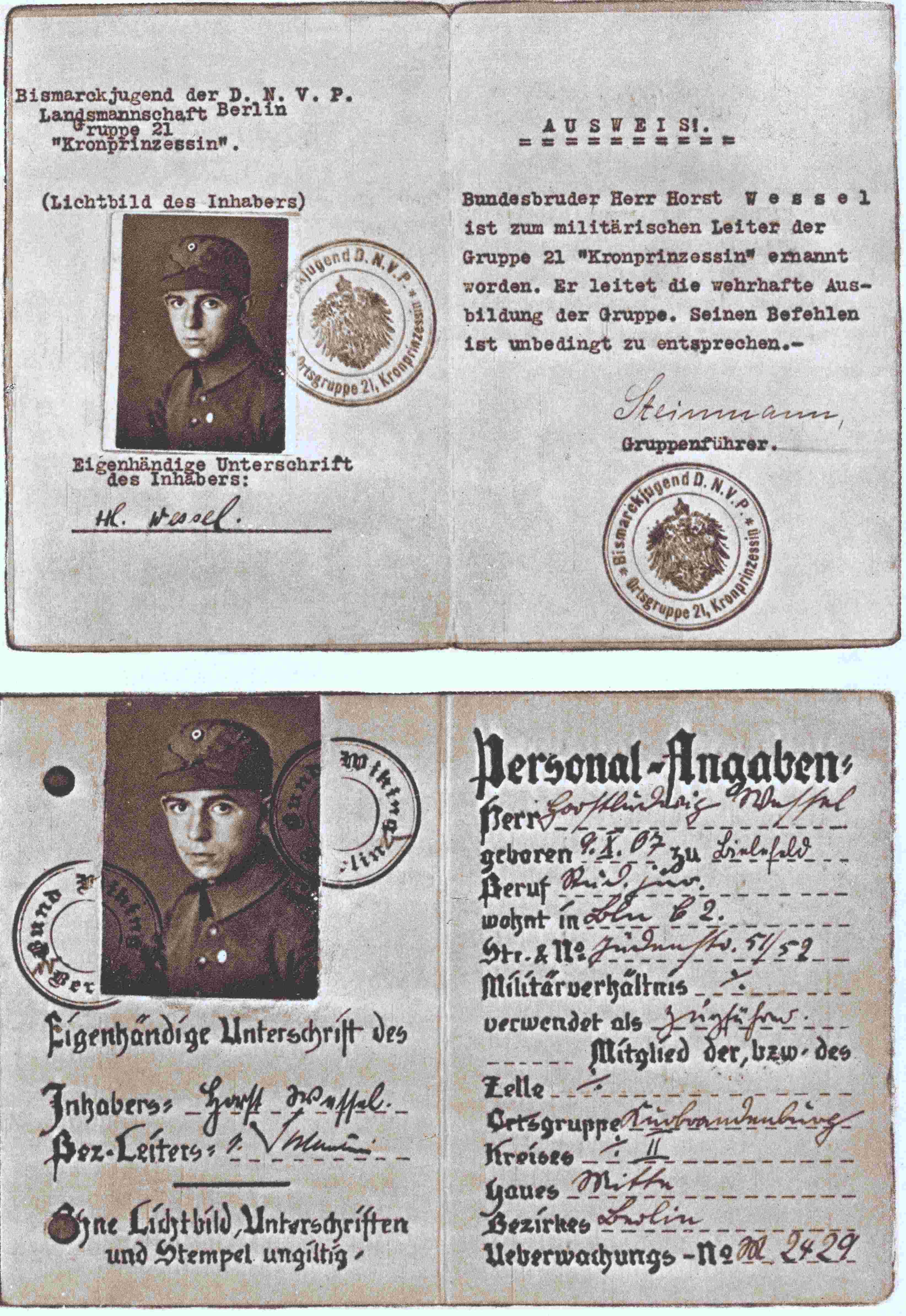 Mitgliederkarten von Horst Wessel im Bismarckjugend und Bund Wiking.